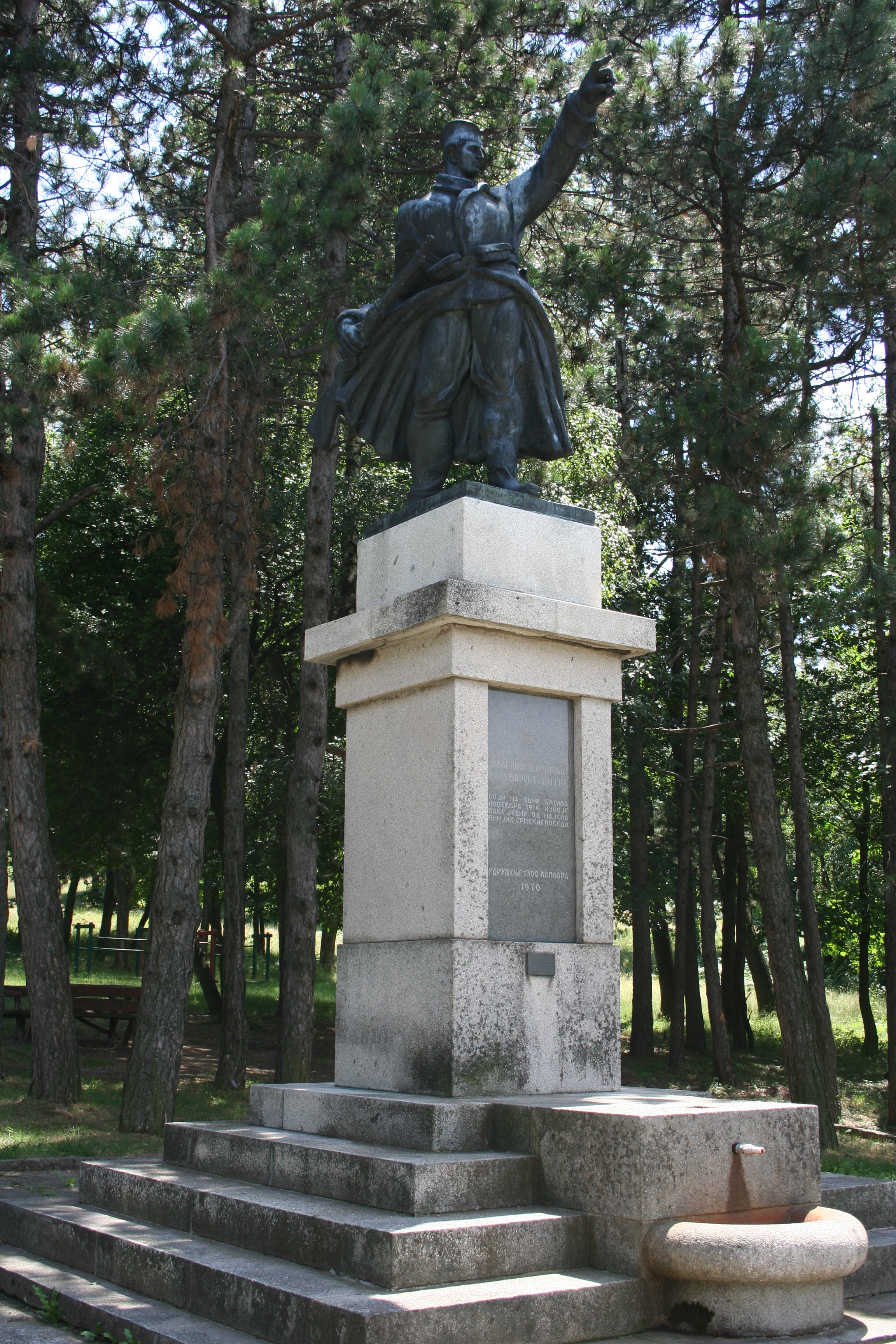 Spomenik na Rajcu